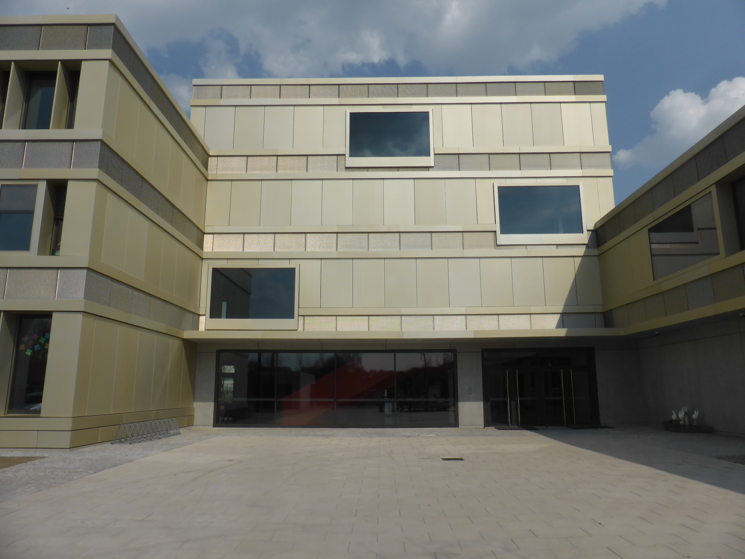 Willy-Brandt-Schule Warschau, neues Gebäude mit Fertigstellung 2014